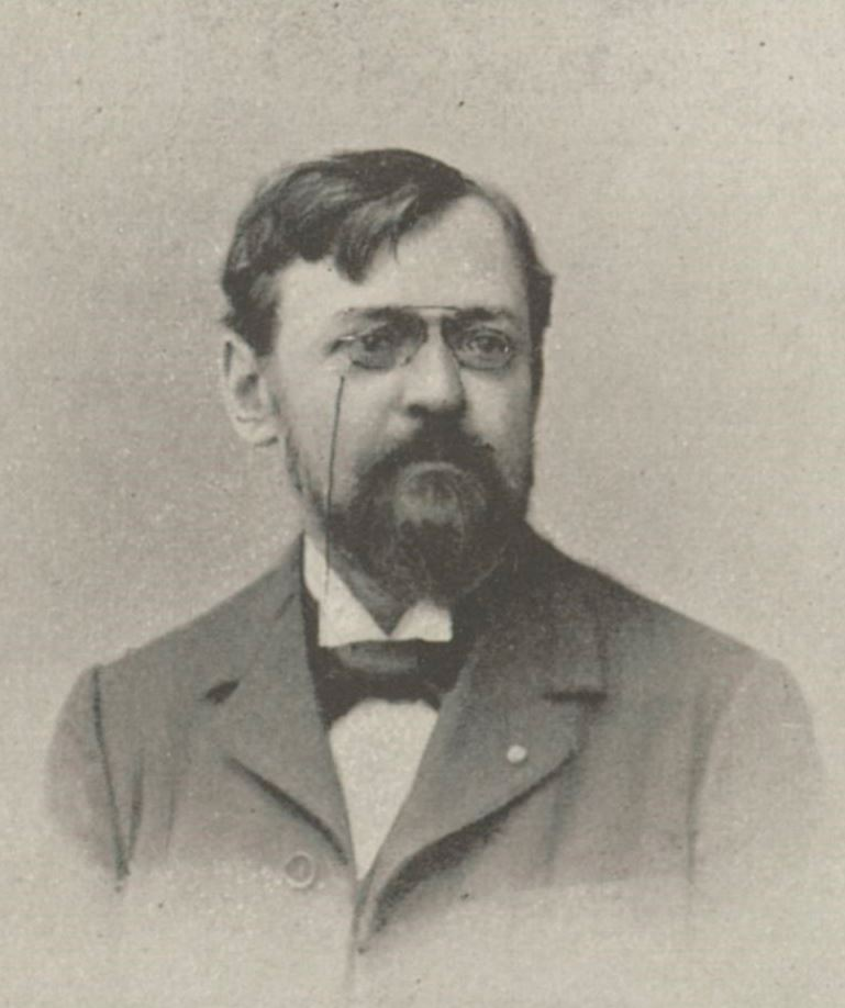 "M. Paul Merwart, peintre de la Marine et des colonies".